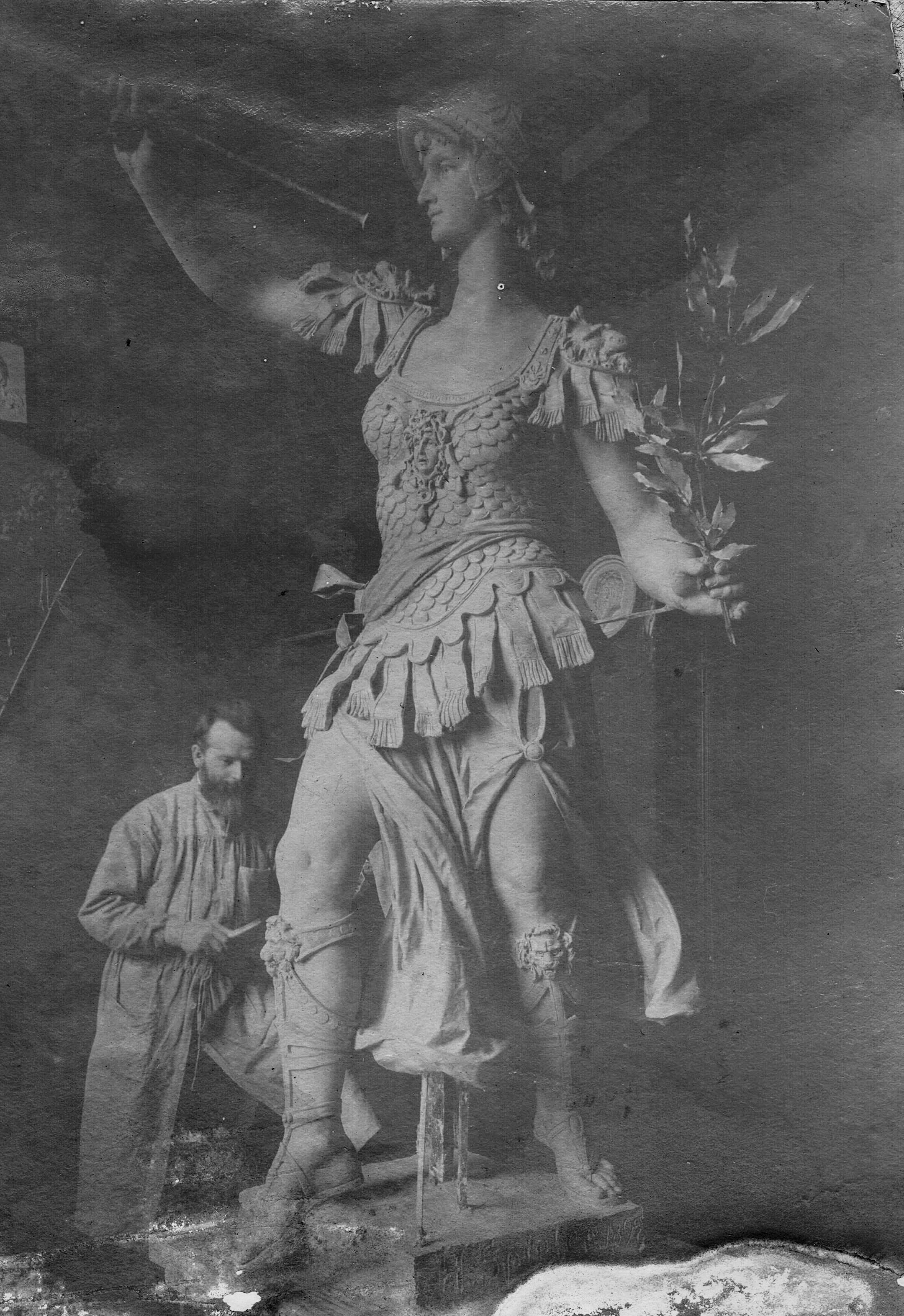 Hugo Spieler bei der Arbeit an der Viktoriastatue für das Viktoriahaus in Dresden